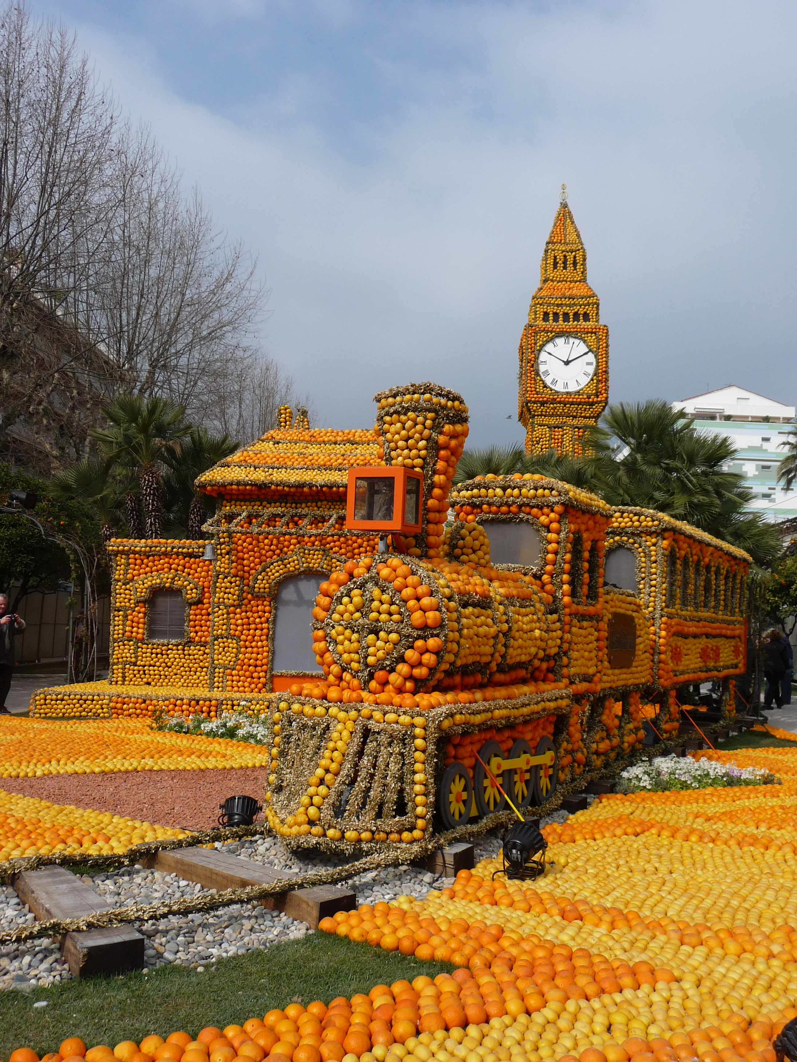 Fête du citron à Menton (France) le 4 mars 2013.